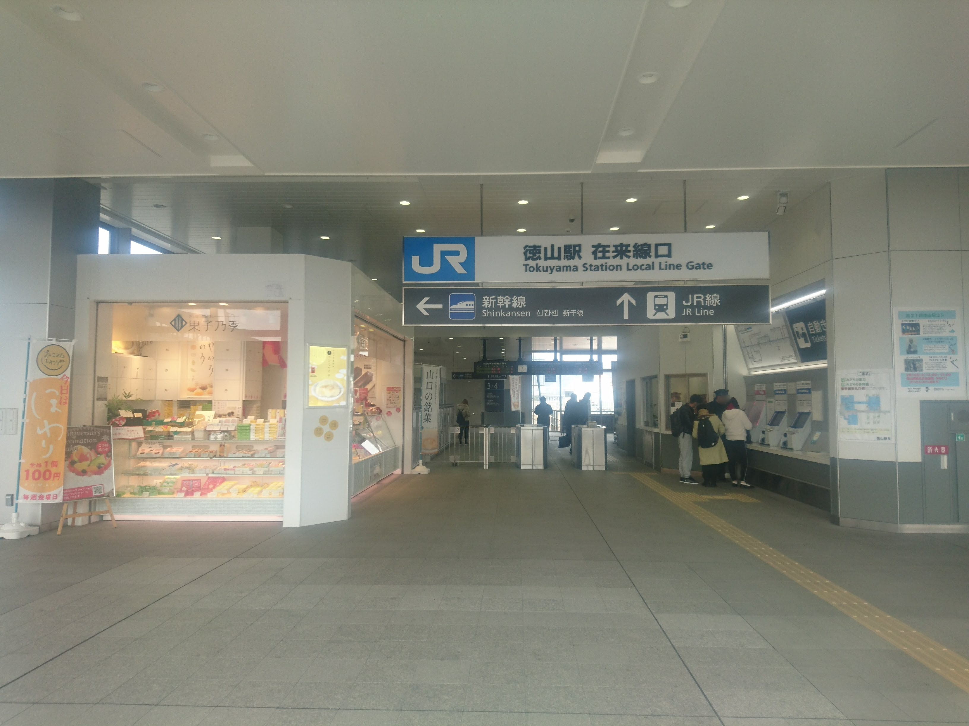 JR徳山駅在来線口 （徳山駅南北自由通路より撮影）